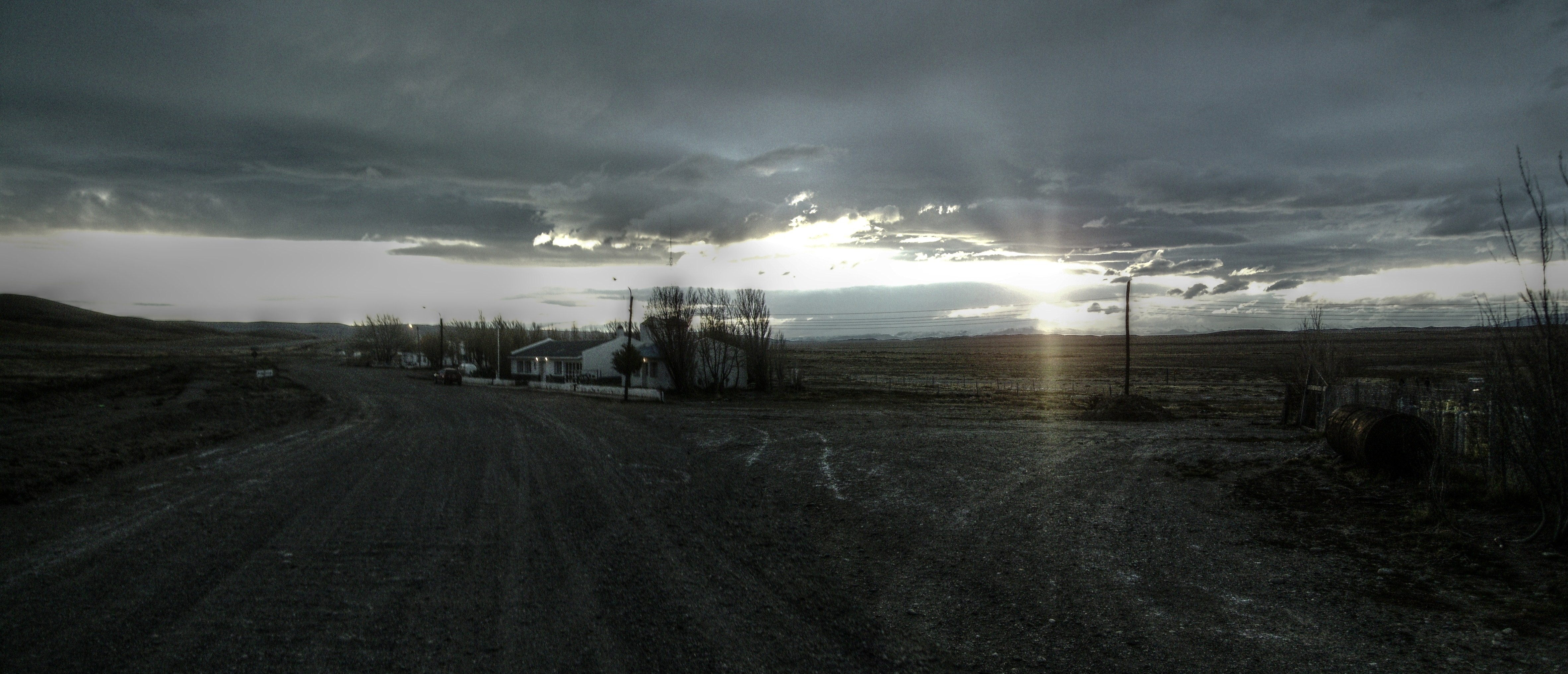 Bajo Caracoles